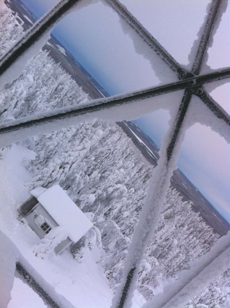 Vy från/genom utsiktstornet, halvvägs upp.